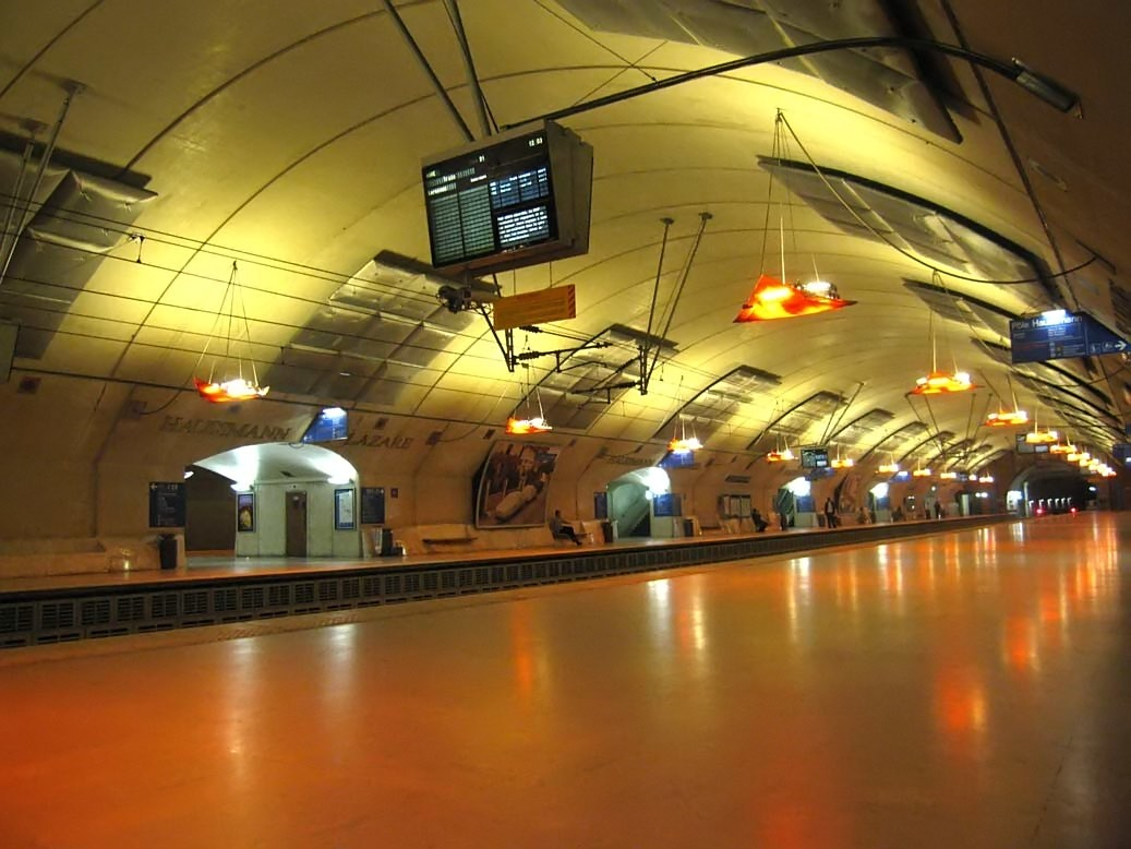 RER Paris ligne E Station Haussman Saint Lazare Lieu : Paris, France Date : Juin 2006 Auteur : photo personnelle